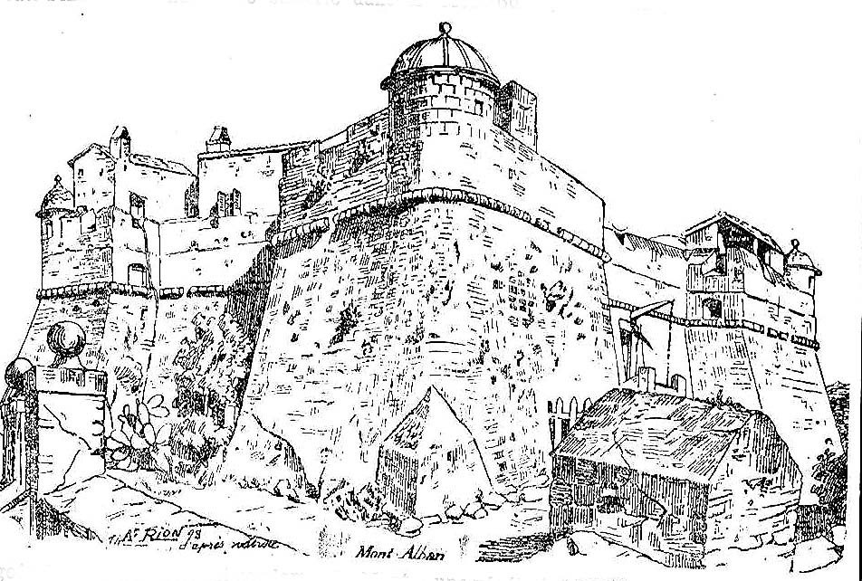 Le fort du mont Alban dessiné par Rion dans le quotidien "Le Petit niçois" du 30 octobre 1898.